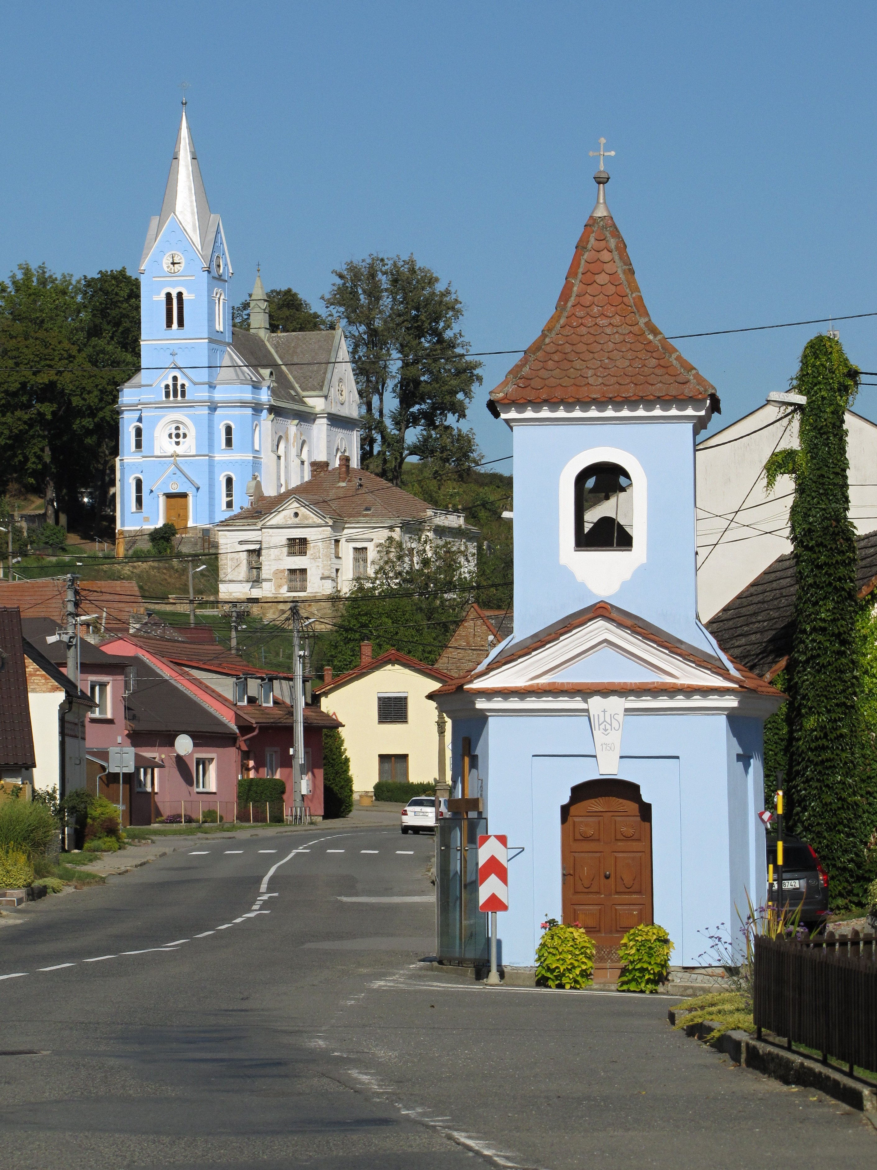 Kaple svatého Prokopa a kostel svatého Prokopa ve Stříbrnicích